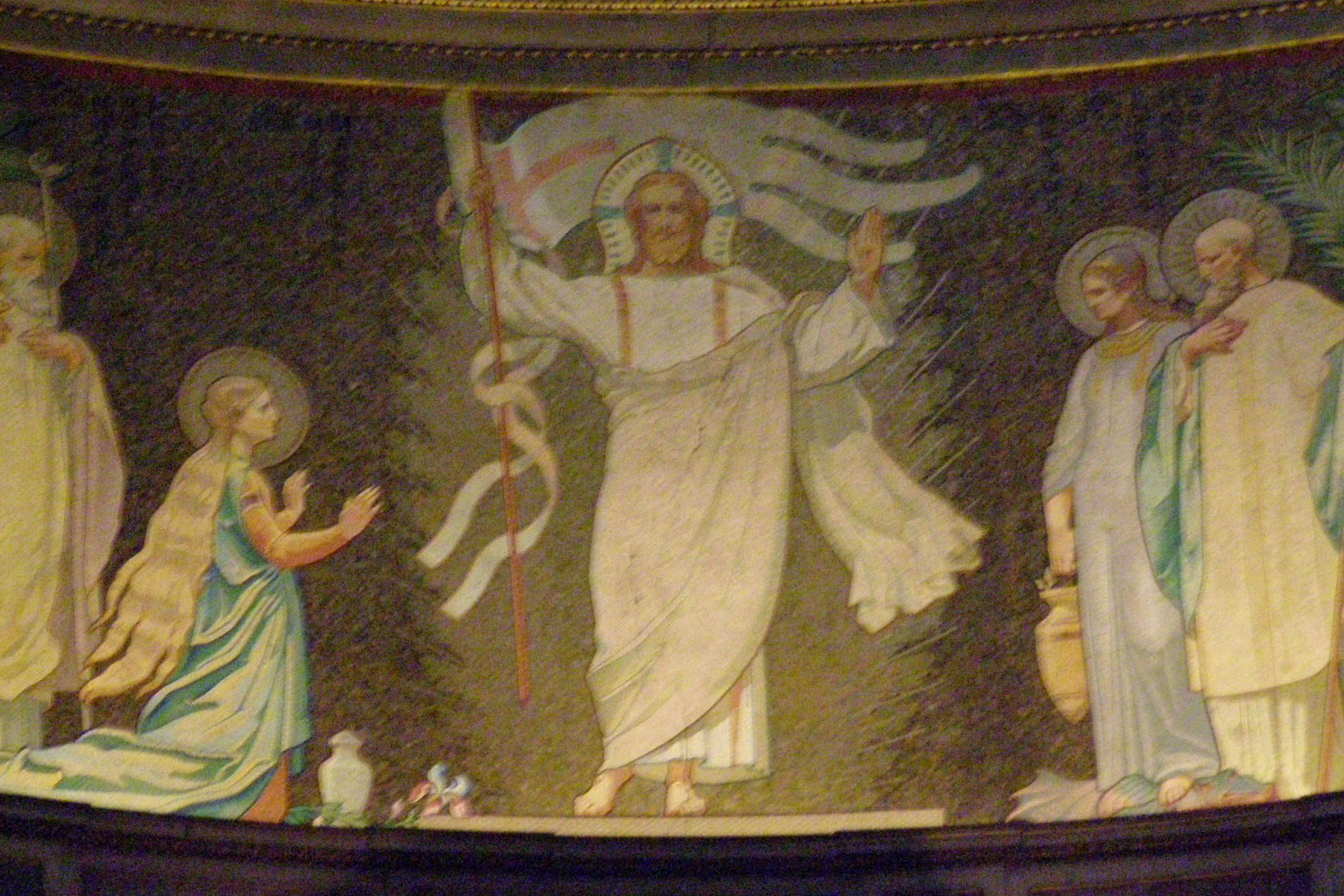 Église de la Madeleine